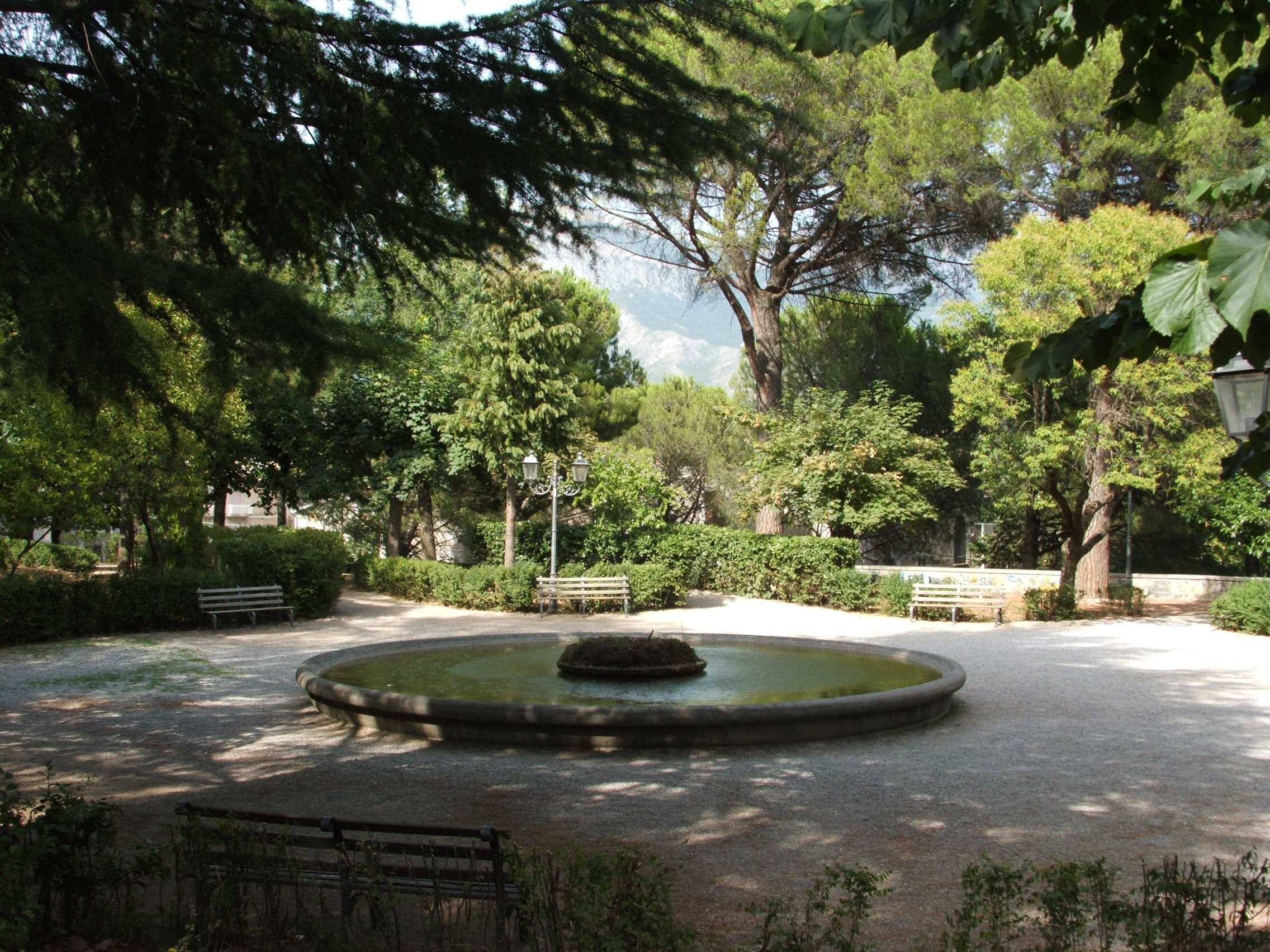 Villa comunale di Morano Calabro (Cosenza): vista della fontana centrale.